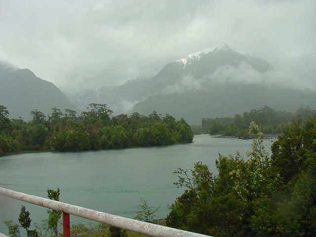 Vista del Volcán Corcovado desde el puente sobre el río Yelcho, en la localidad de Puerto Cárdenas, a unos 20 kilómetros de Chaitén. Visita del Presidente Ricardo Lagos, Ministros, junto al filántropo Douglas Tompkins y a ecologistas encabezados por Sara Larraín de Chile Sustentable y Flavia Liberona de Fundación Terram De visita presidencial y de ecologistas a inauguración del Parque Corcovado